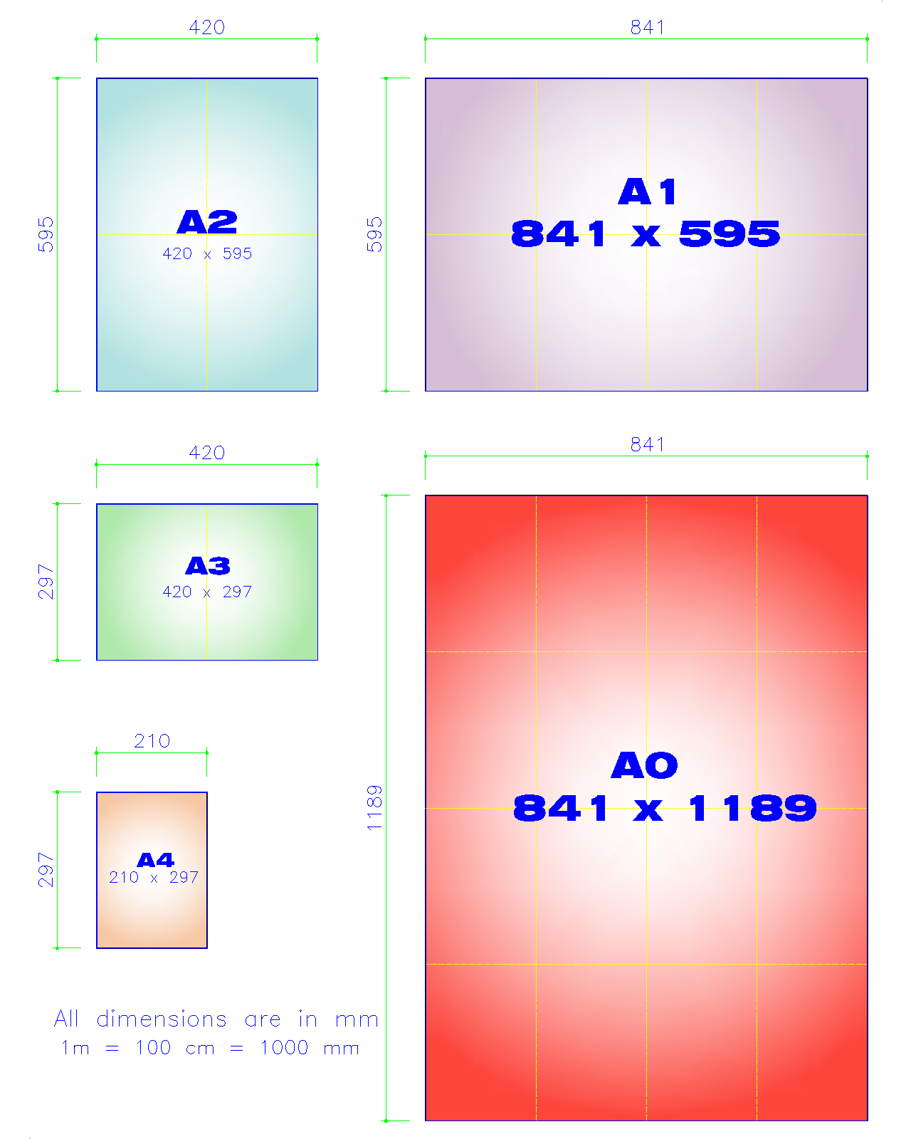 കടലാസ് വലിപ്പം